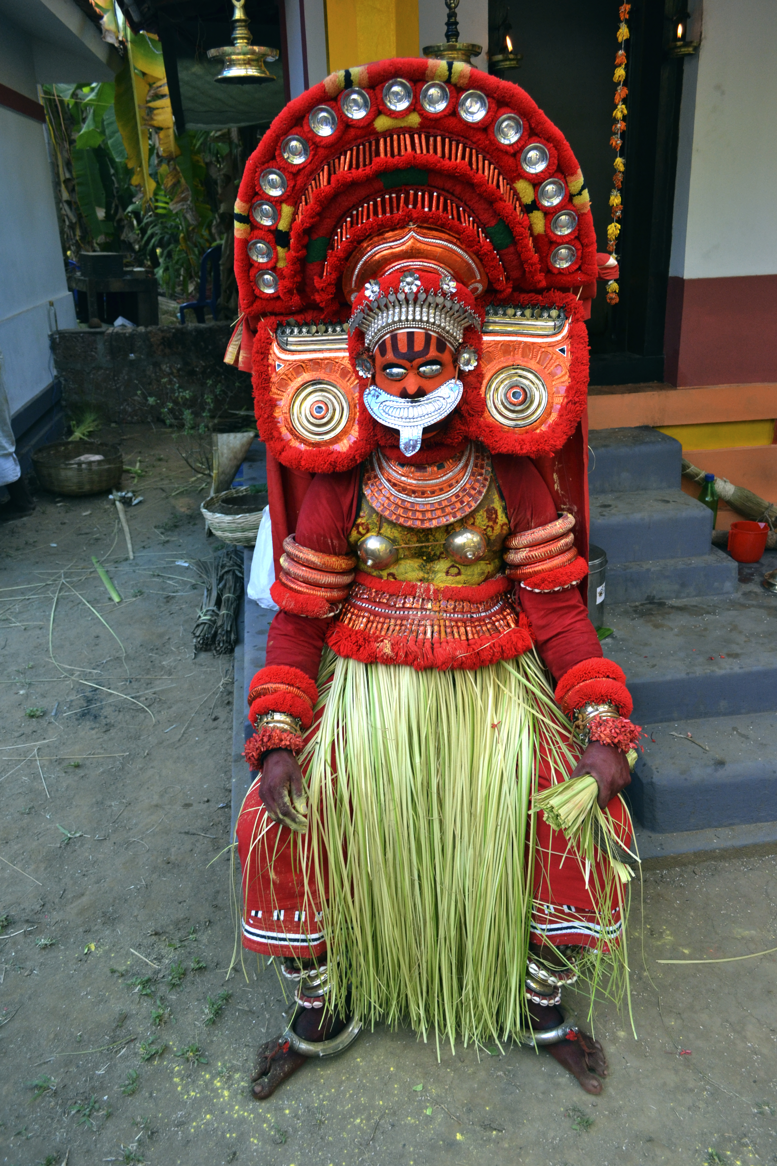 കുറത്തി തെയ്യം